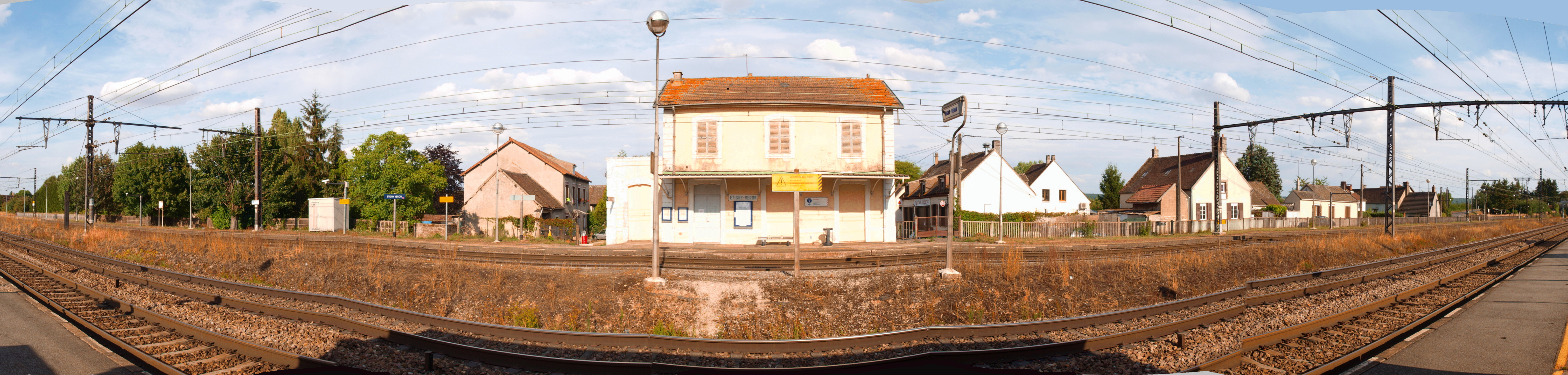 Gare ferroviaire d'Étigny - Véron (Yonne, France) ; vue panoramique aberrante.